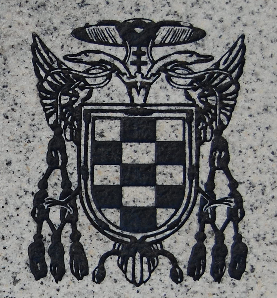 Escudo de la Sociedad de Condueños de Alcalá de Henares (Comunidad de Madrid - España) pintado sobre un monolito de granito ubicado en la plaza de Palacio. En conmemoración de su primera reunión de vecinos, celebrada en Palacio Arzobispal el 28 de octubre de 1850.